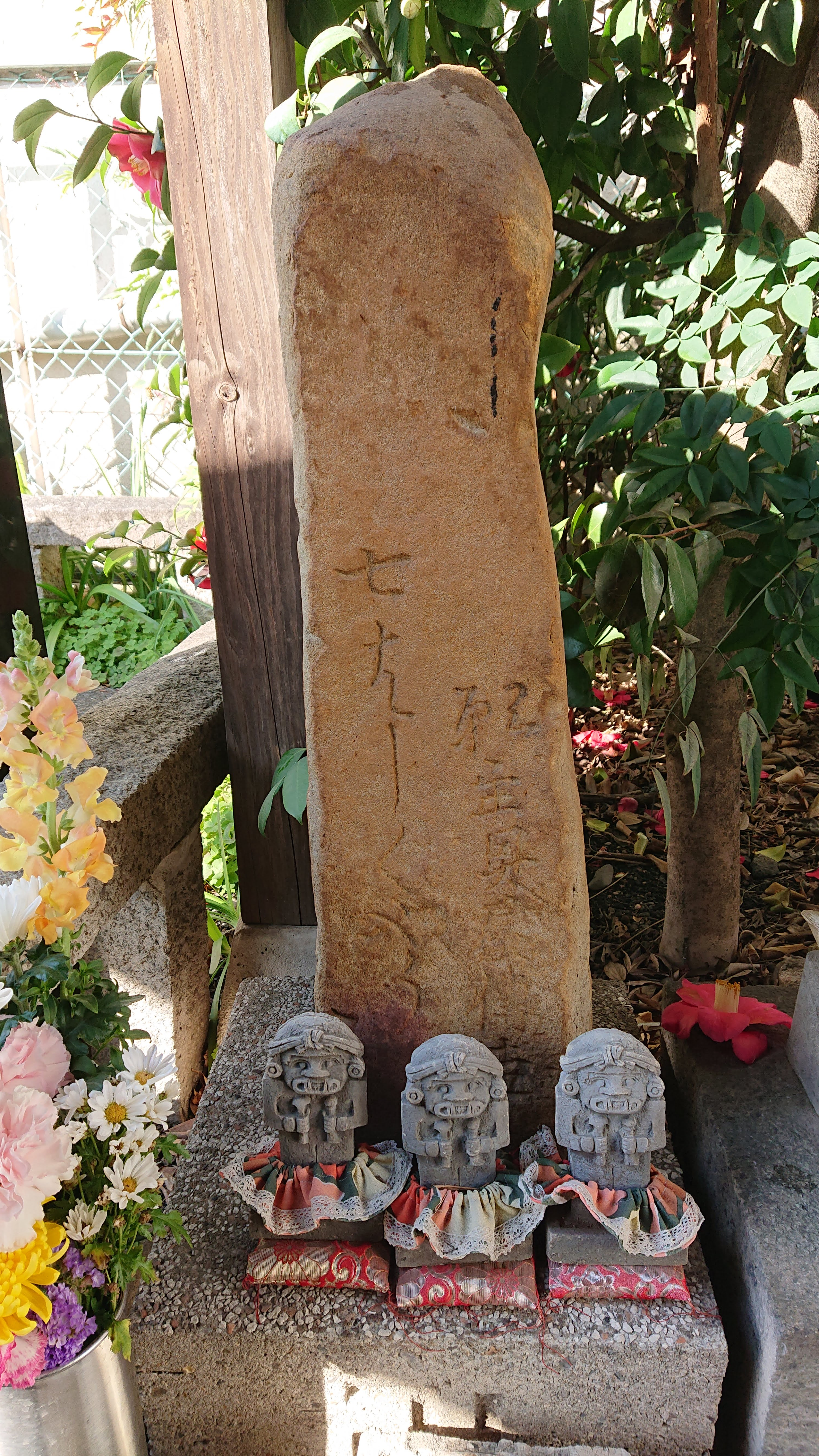 名古屋市熱田区花町の畑中地蔵 「七はしくやう」碑